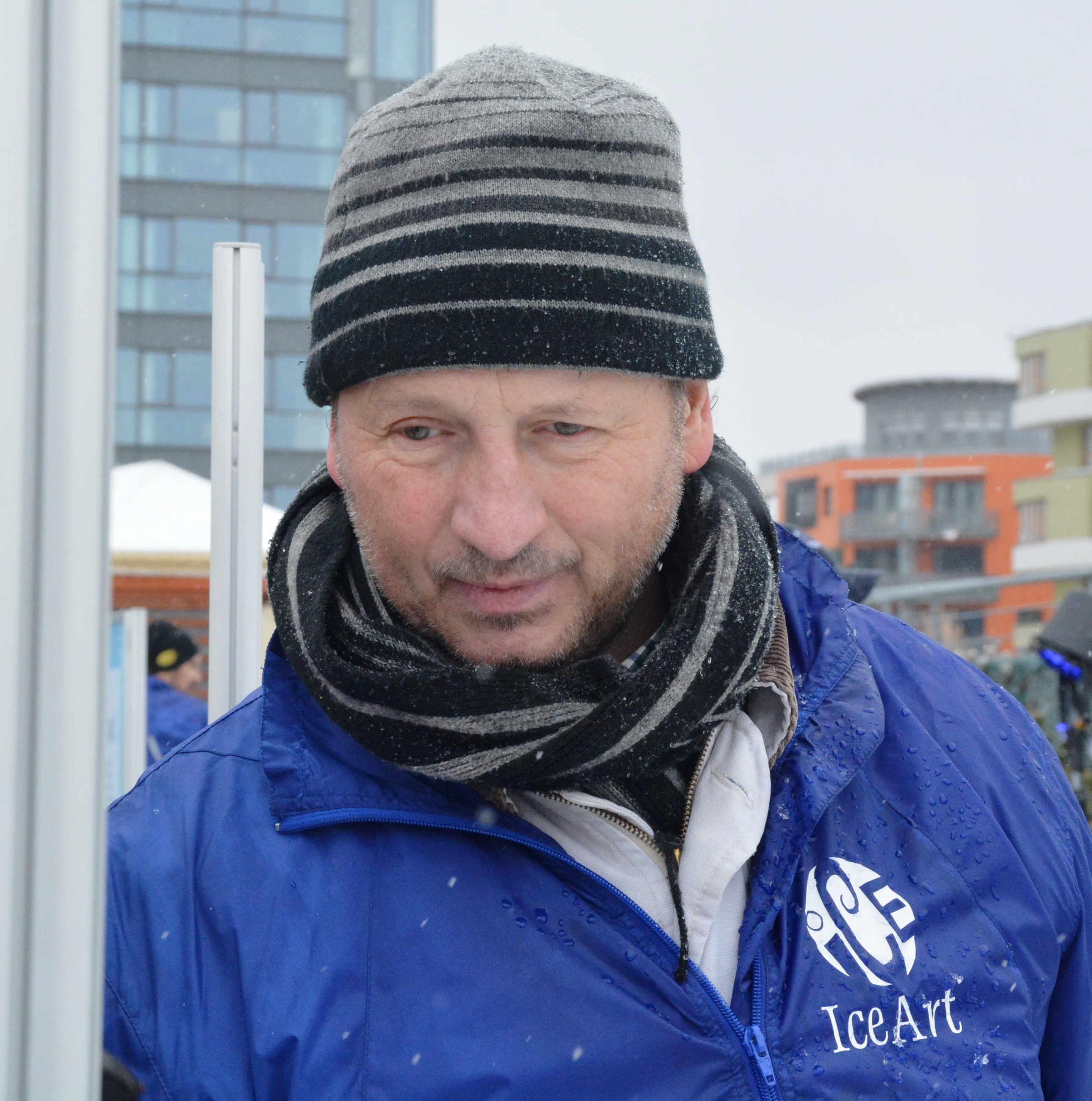 Jan Švadlenka, český sochař a bývalý fotbalista